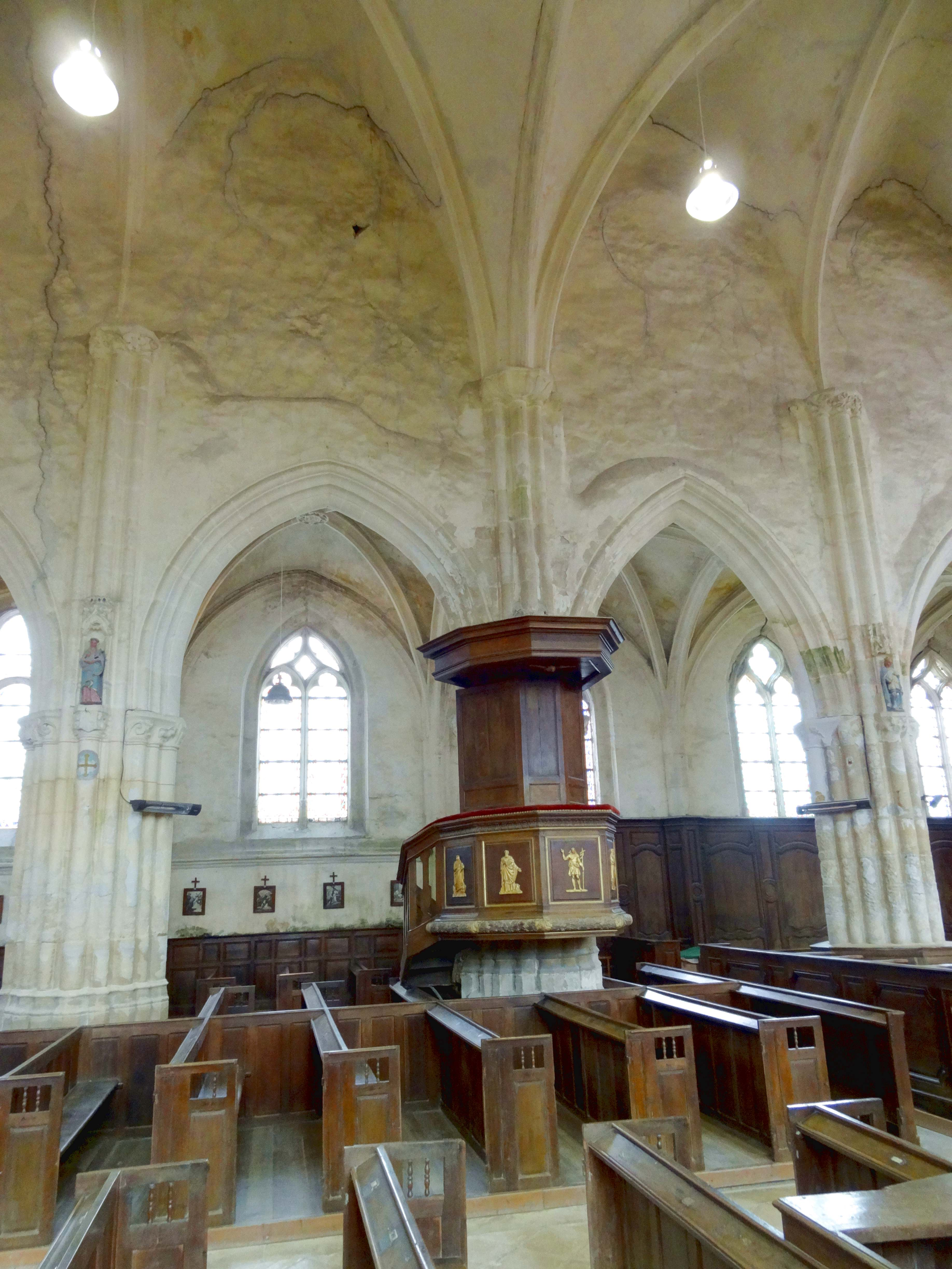 Intérieur de l'église - voir titre.